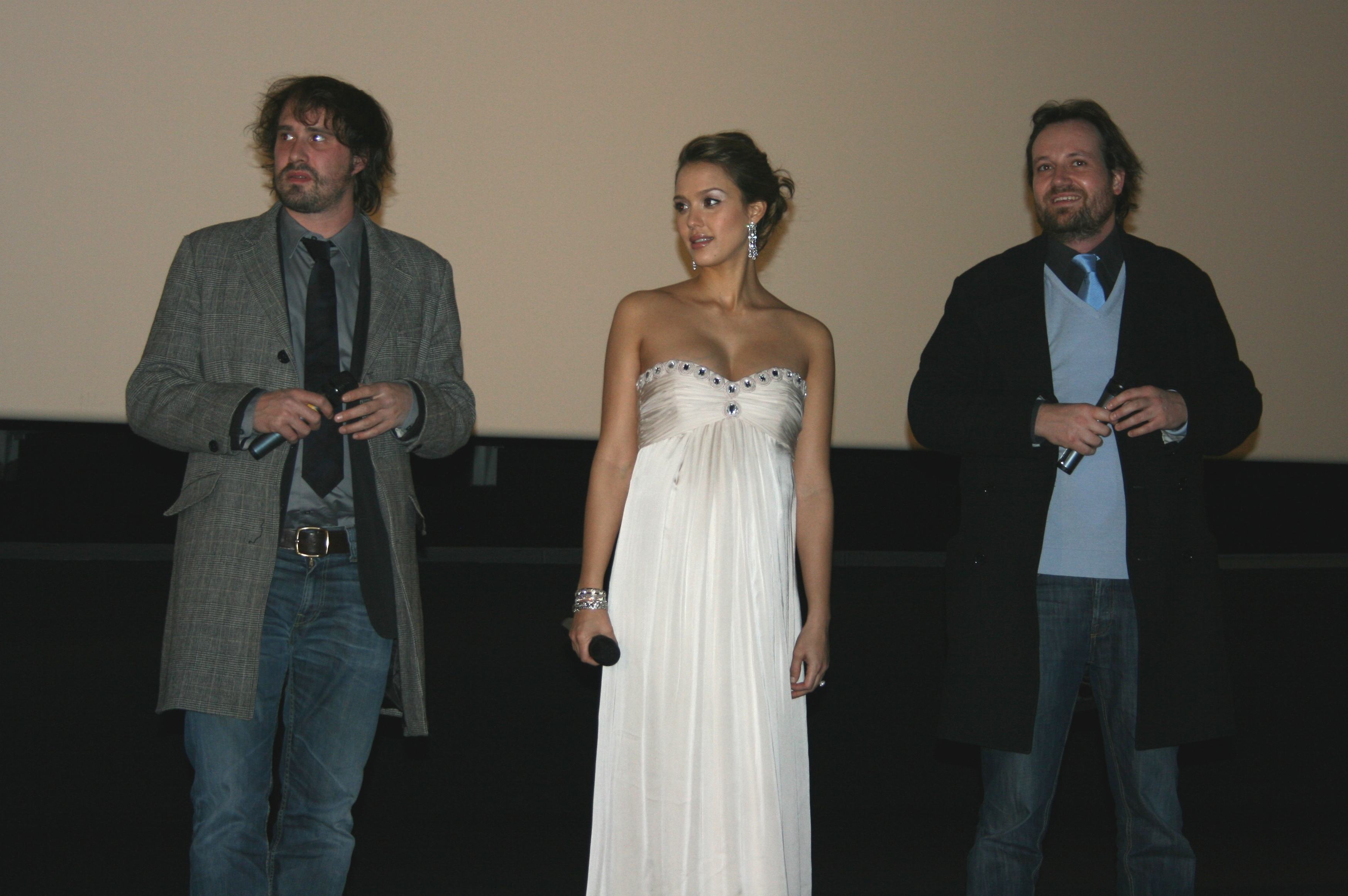 David Moreau, Jessica Alba et Xavier Palud à l'avant-première de The Eye diffusée à l'UGC Ciné Cité La Défense, à Puteaux.